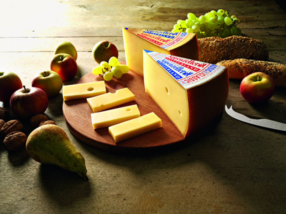 Appenzeller Classic (MILD-WÜRZIG), typischer Käse aus der Ostschweiz